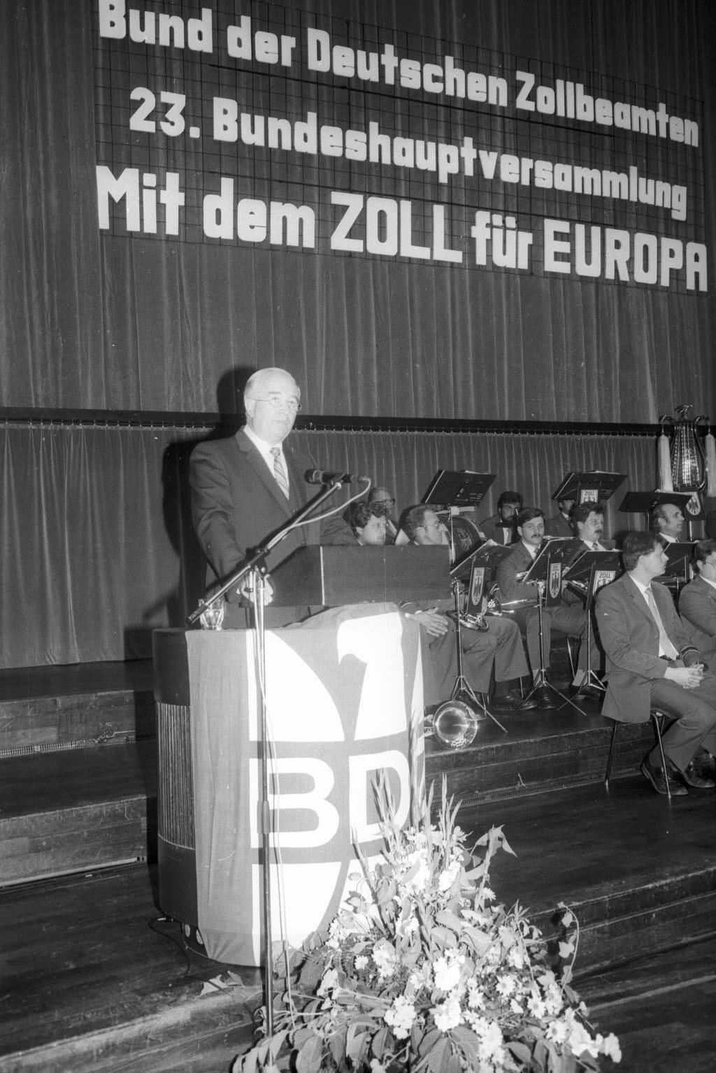 im Schloss. Am Rednerpult der BDZ-Bundesvorsitzende Richard Müller.